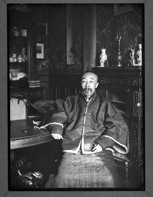 Portrait de Yu Keng